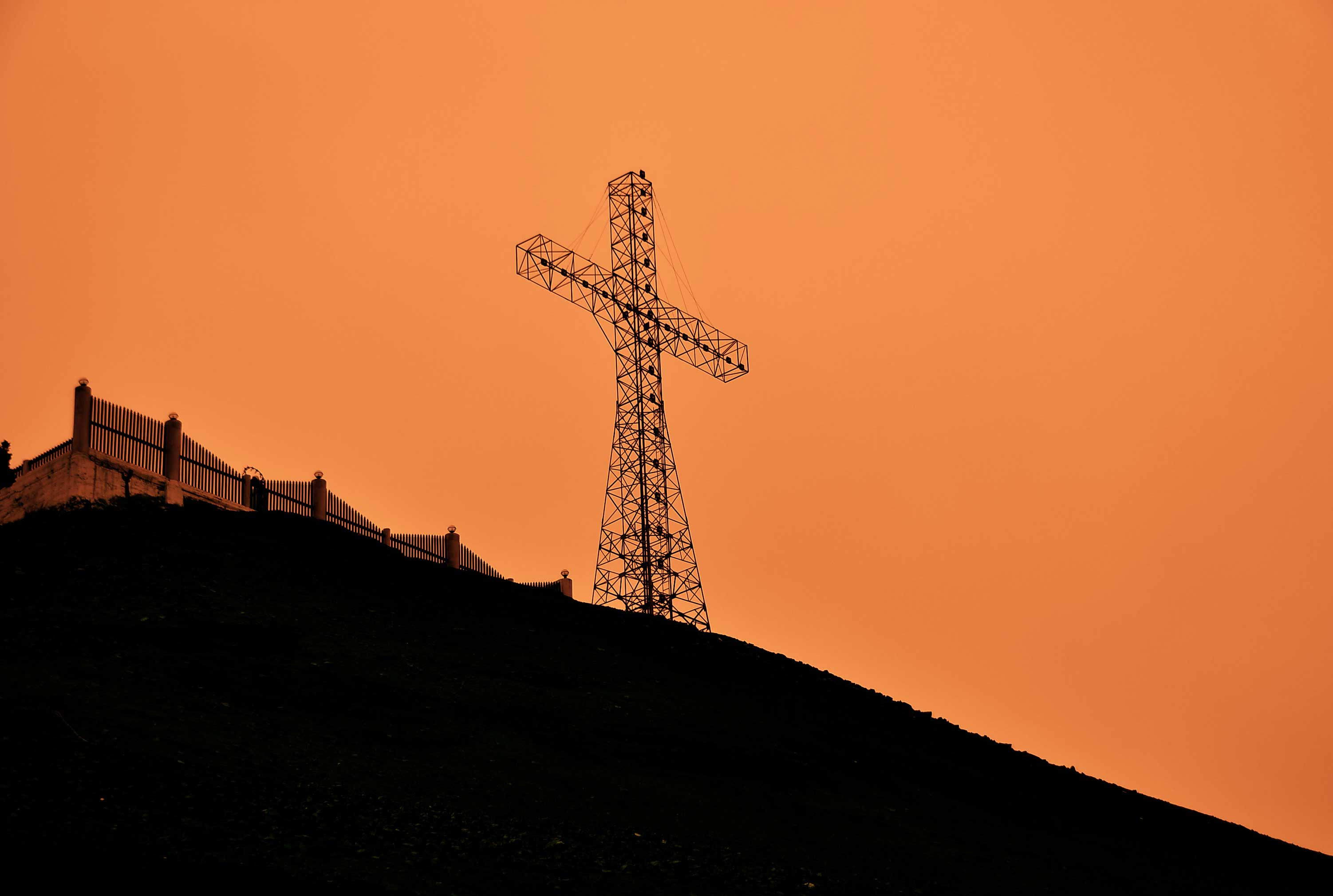 Chorrillos Sunset, Lima, Peru